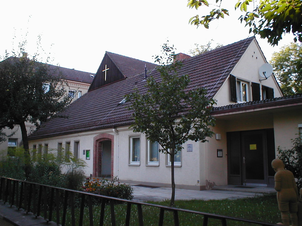 Evangelische Wichernkirche, Heilbronn, erbaut 1948